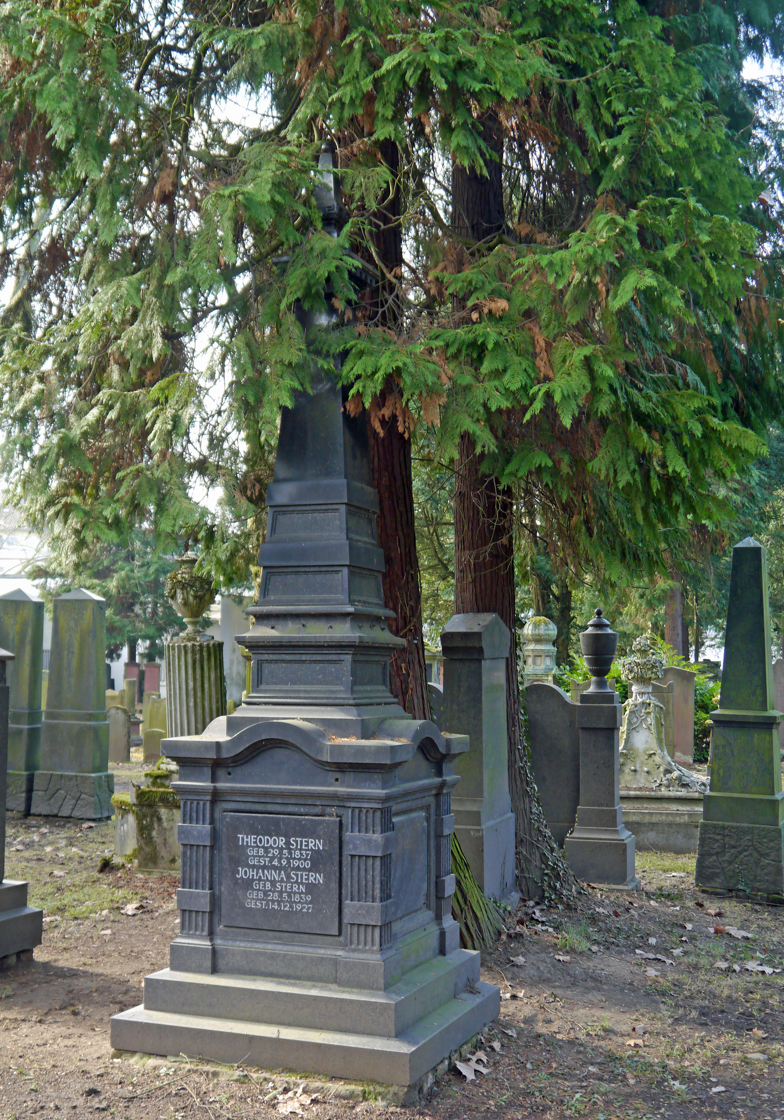 (Alter) Jüdischer Friedhof an der Rat-Beil-Strasse in Ffm. Obelisk-Grabstein von Theodor Stern.